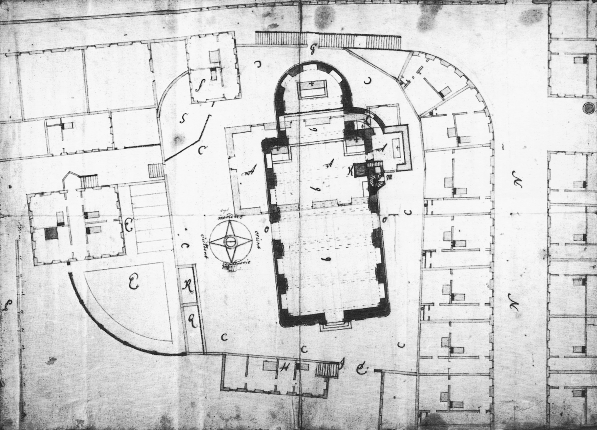 „Grundriss der alten und neuen Neckarsulmer Kirchenbauten und Circumferenz“